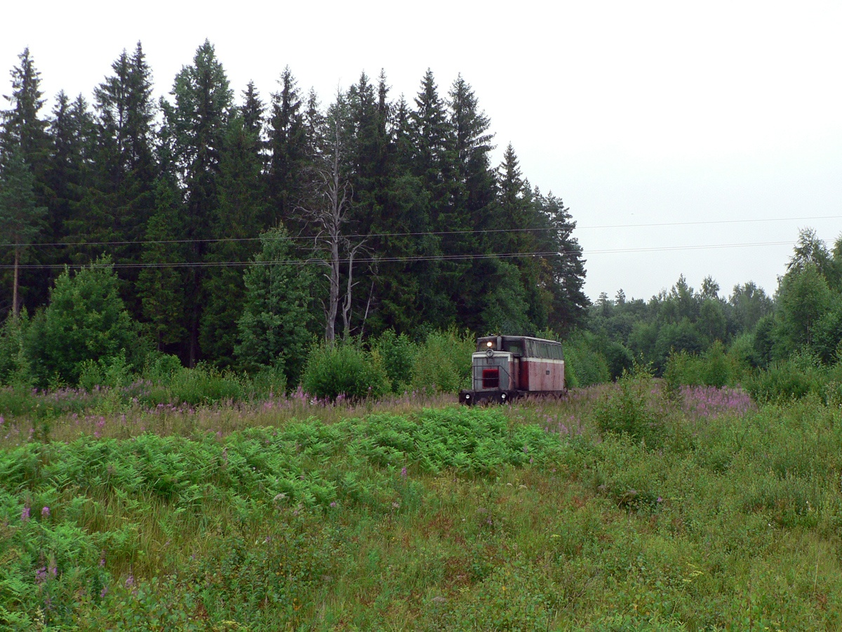 ТУ6П-0013 у переезда